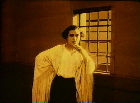 Francesca Bertini, attrice cinematografica italiana, fotografata sul set di Assunta Spina (1915).